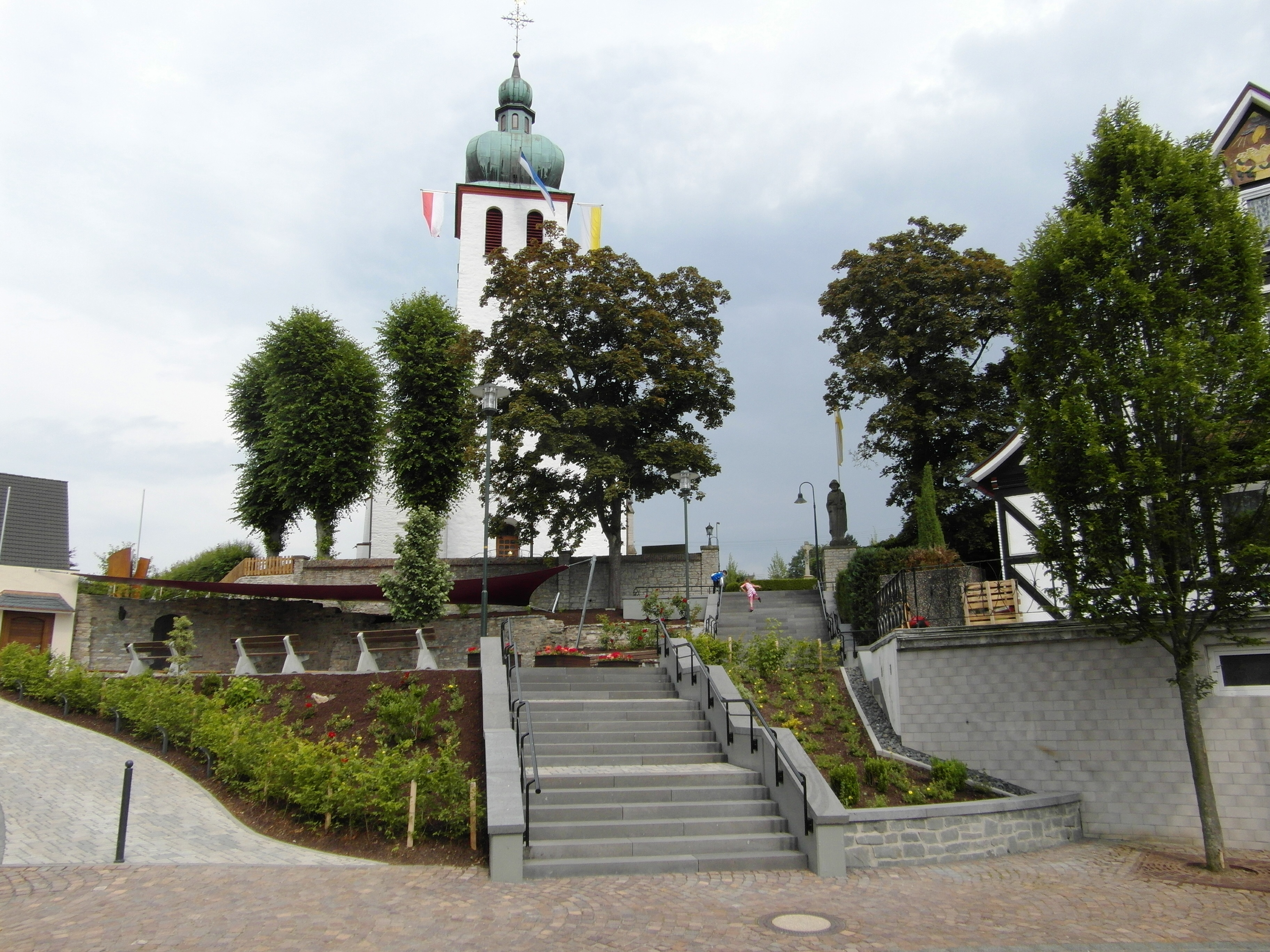 Der am 18.Juni 2014 eingeweihte Dorfplatz Gellestatt in Elspe - ein Gemeinschaftsprojekt der Dorfgemeinschaft